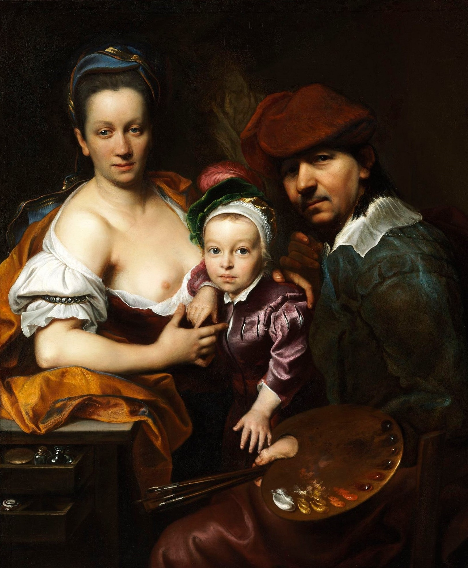 Self-portrait